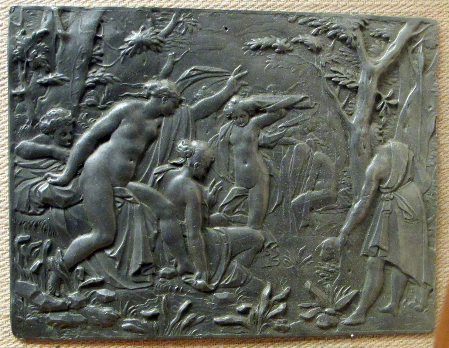 Placchette rinascimentali